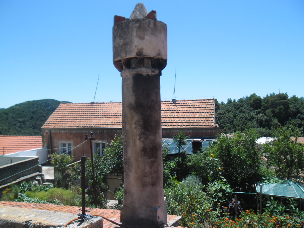 fumar, tipični lastovski dimnjak